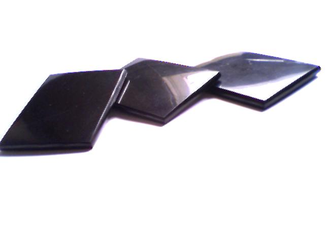 Защитни пластини за мобилни телефони от Шунгит